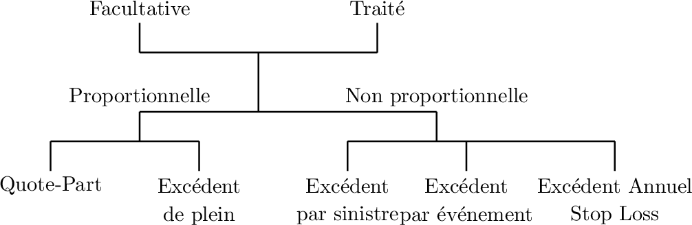 Les différents types d'entente en Réassurance